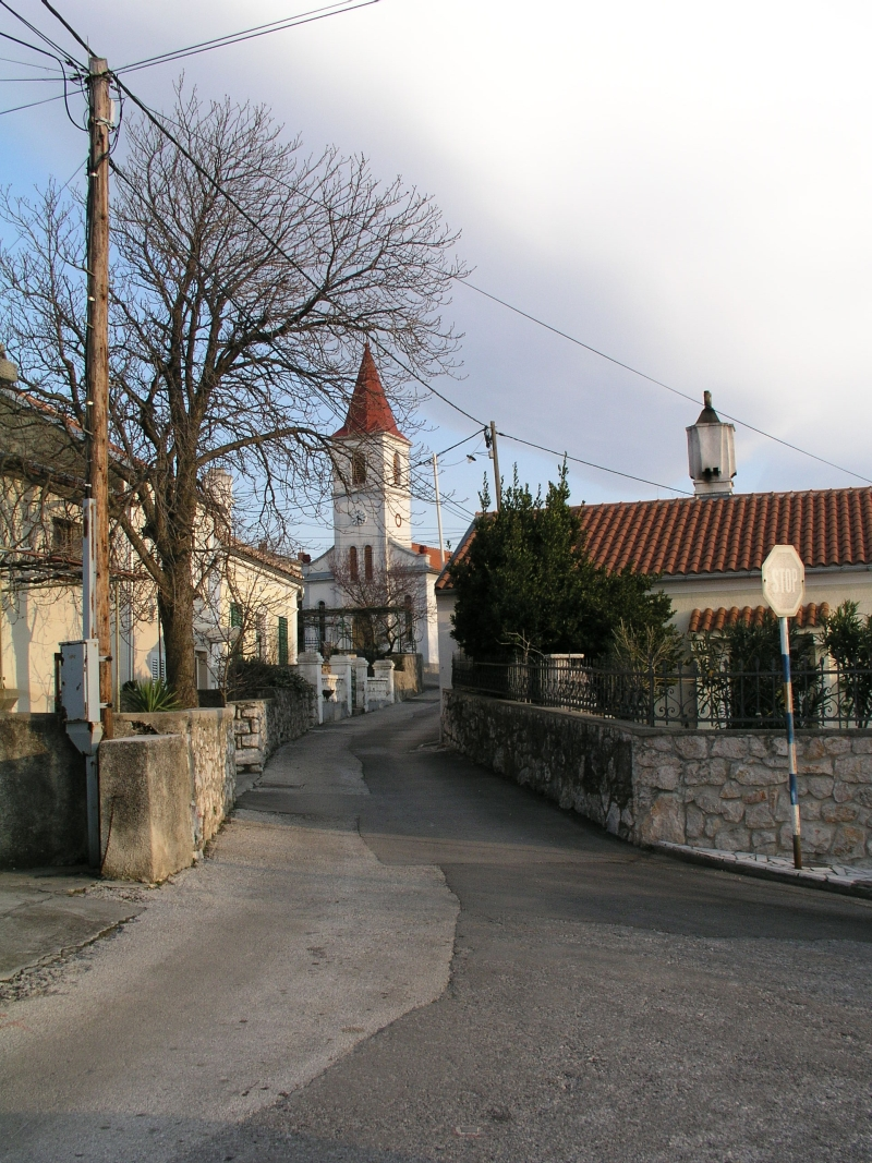 Šmrika, Hrvatska